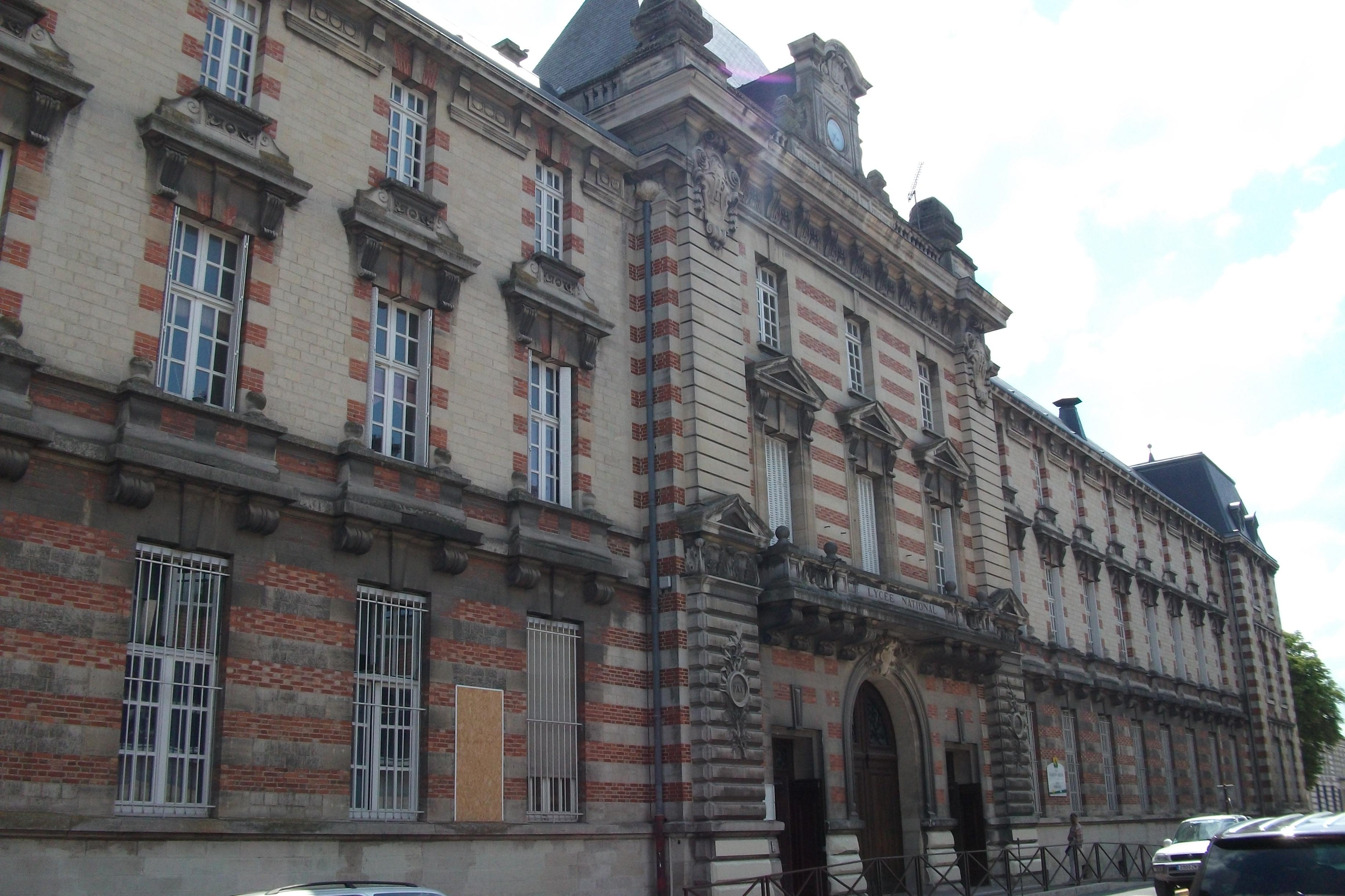 Lycée Pierre Bayen de Châlons se trouvant 22 rue du Lycée.